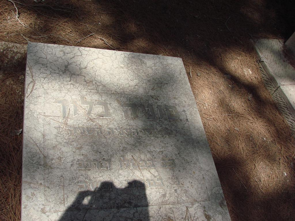 סוניה בלוך